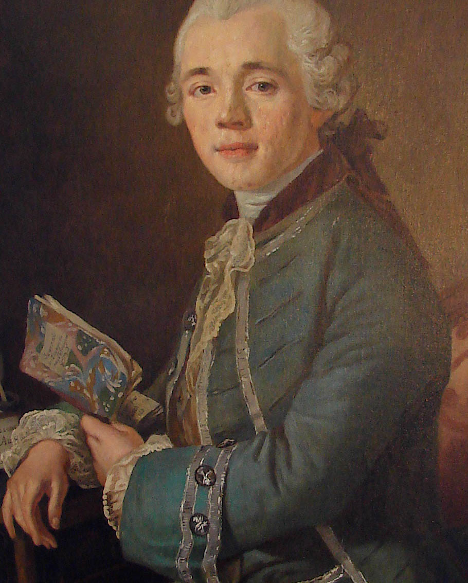 Nicolai Benjamin Aall Til Ulefos (1739–1798), Søndre Brekke Gård, Skien. Originalen malt av Lorentz Pasch i Paris i 1763.